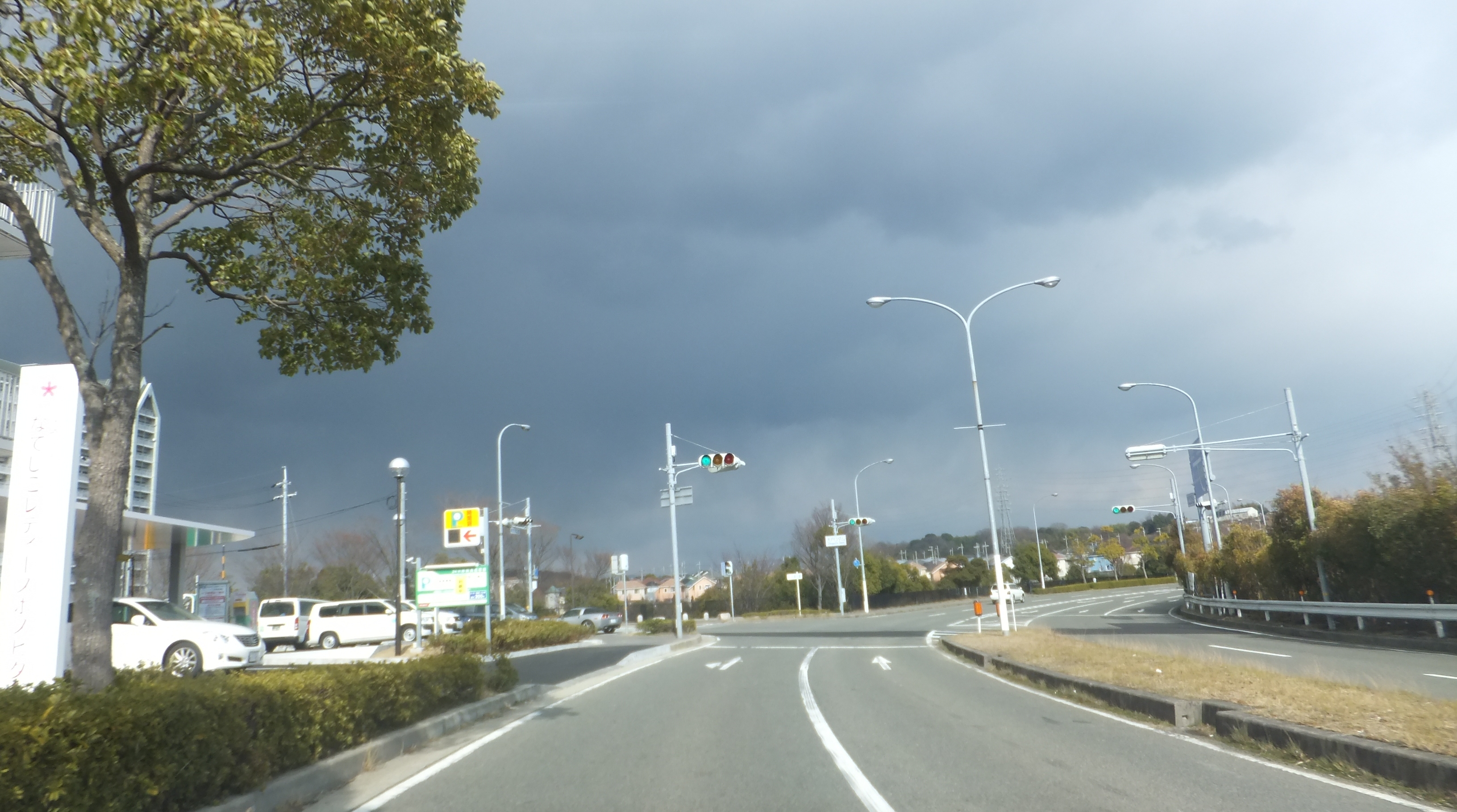 兵庫県神戸市西区井吹台東町3丁目